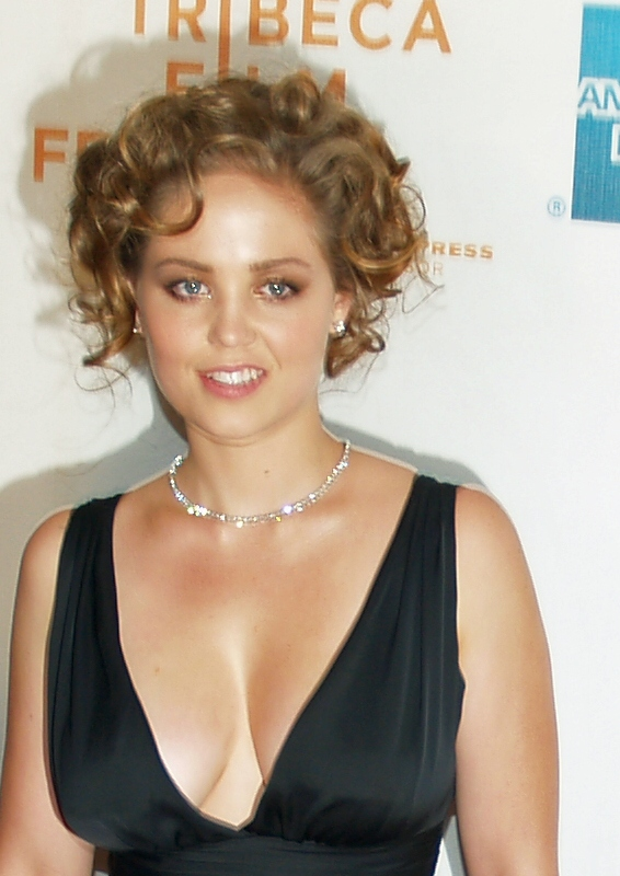 Erika Christensen by David Shankbone